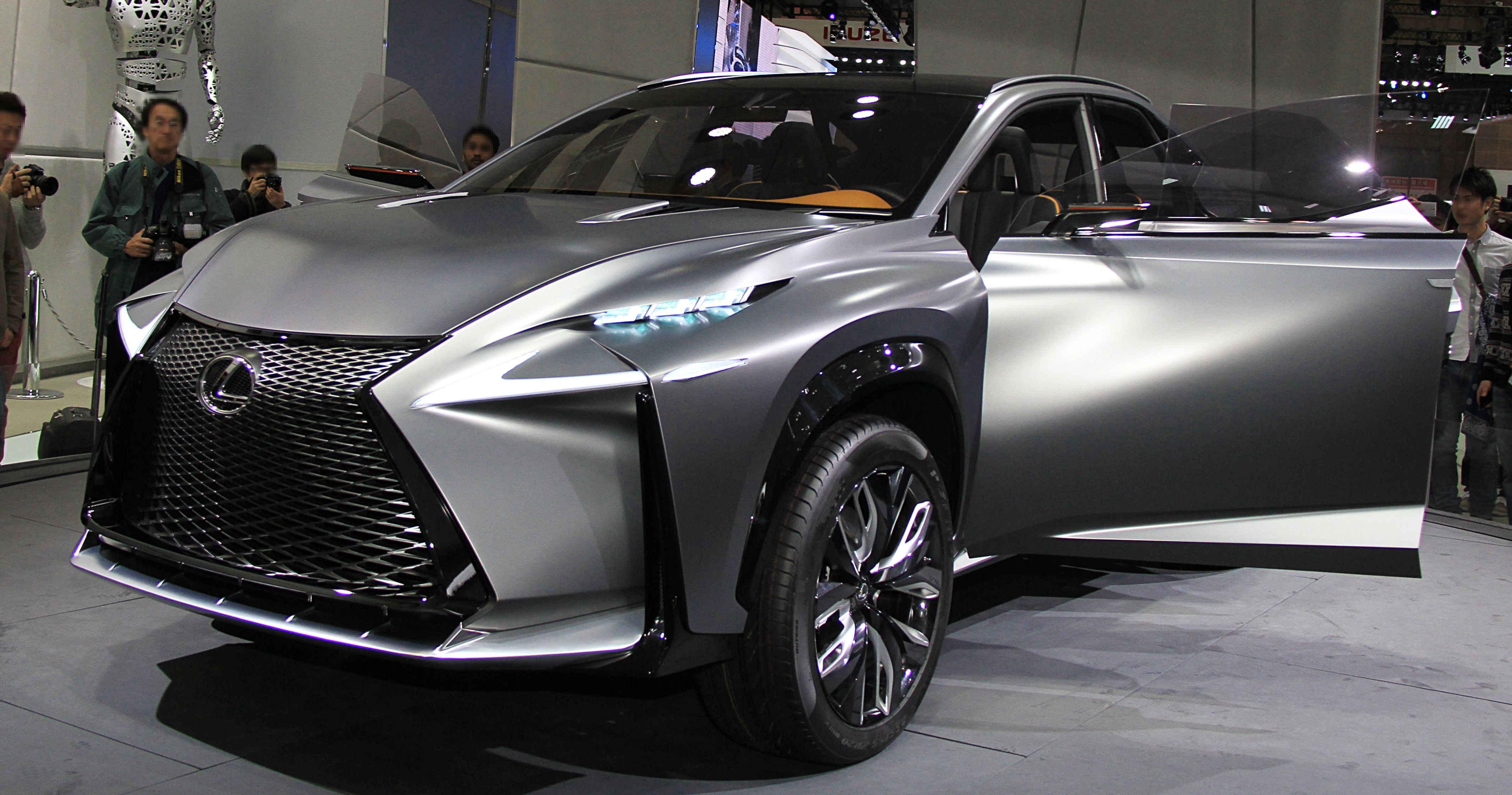 Lexus LF-NX